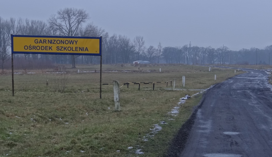 Garnizonowy Ośrodek Szkolenia